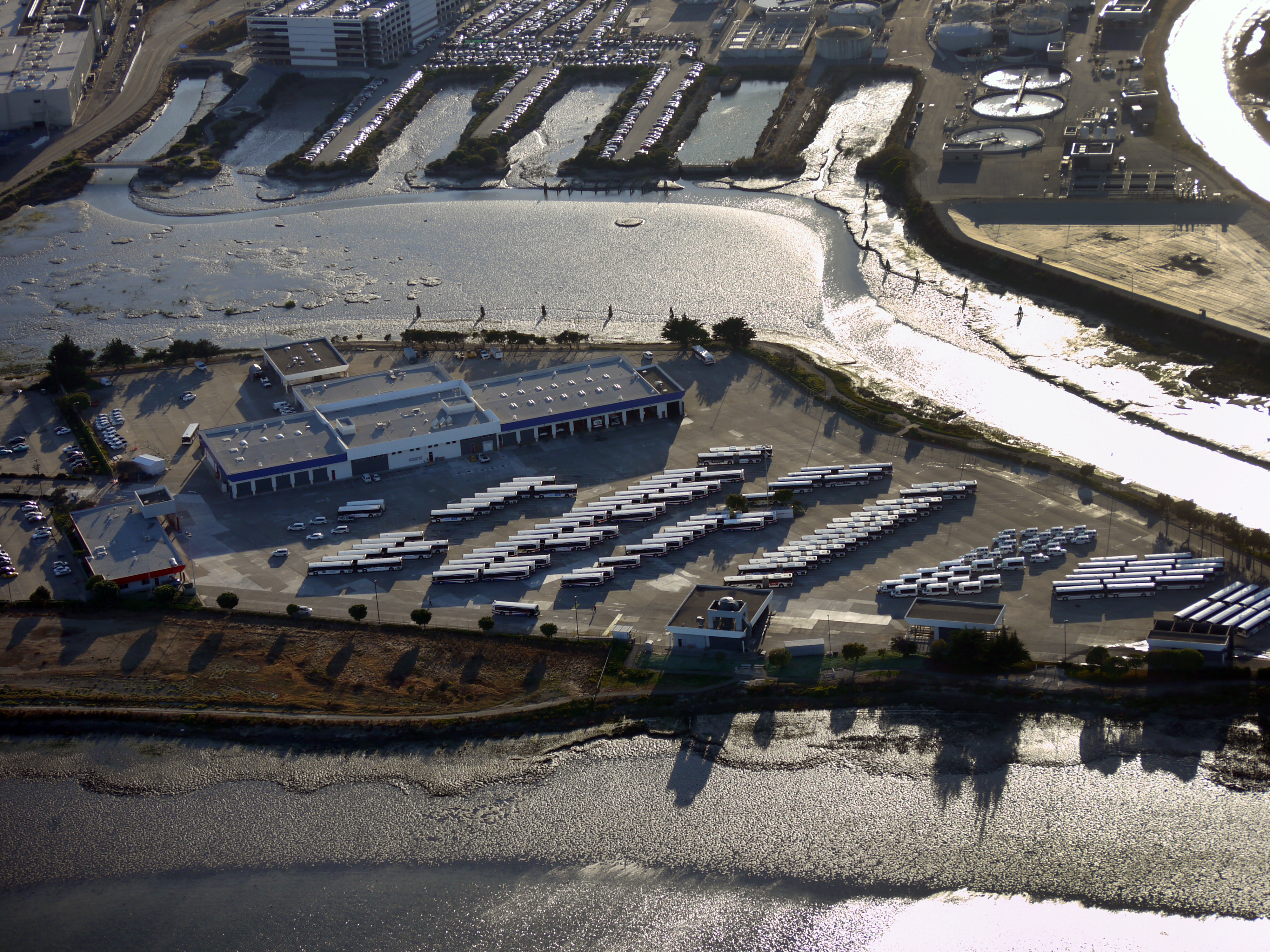 zeppelin-ride-020100925-156